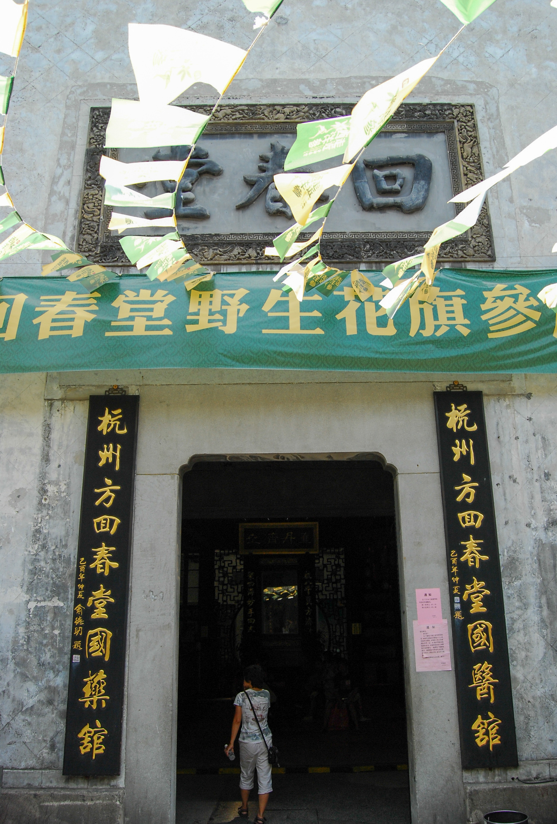 中文（中国大陆）: 方回春堂，杭州市文物保护单位